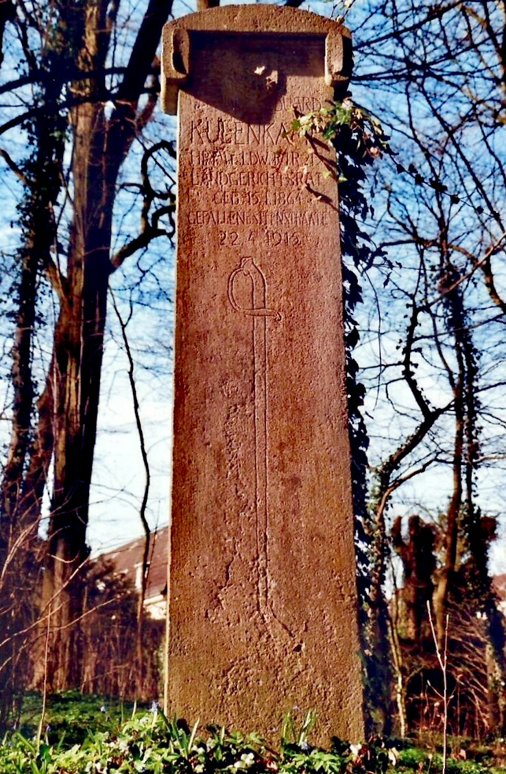 Gedenkstein für den in Flandern gefallenen Eduard Kulenkamp